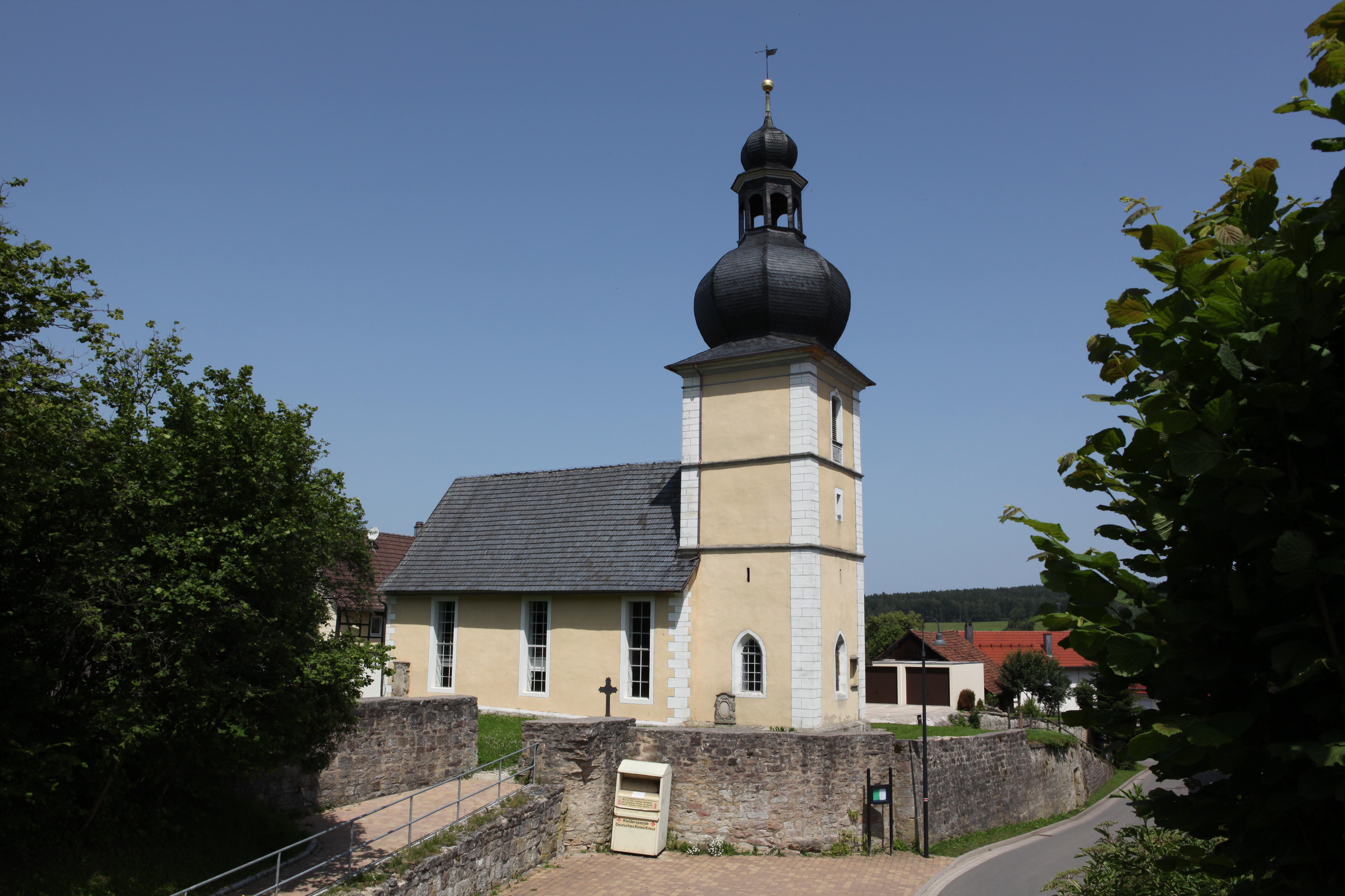 Evangelische Kirche St. Jakobus in Harras, OT von Eisfeld, Thüringen